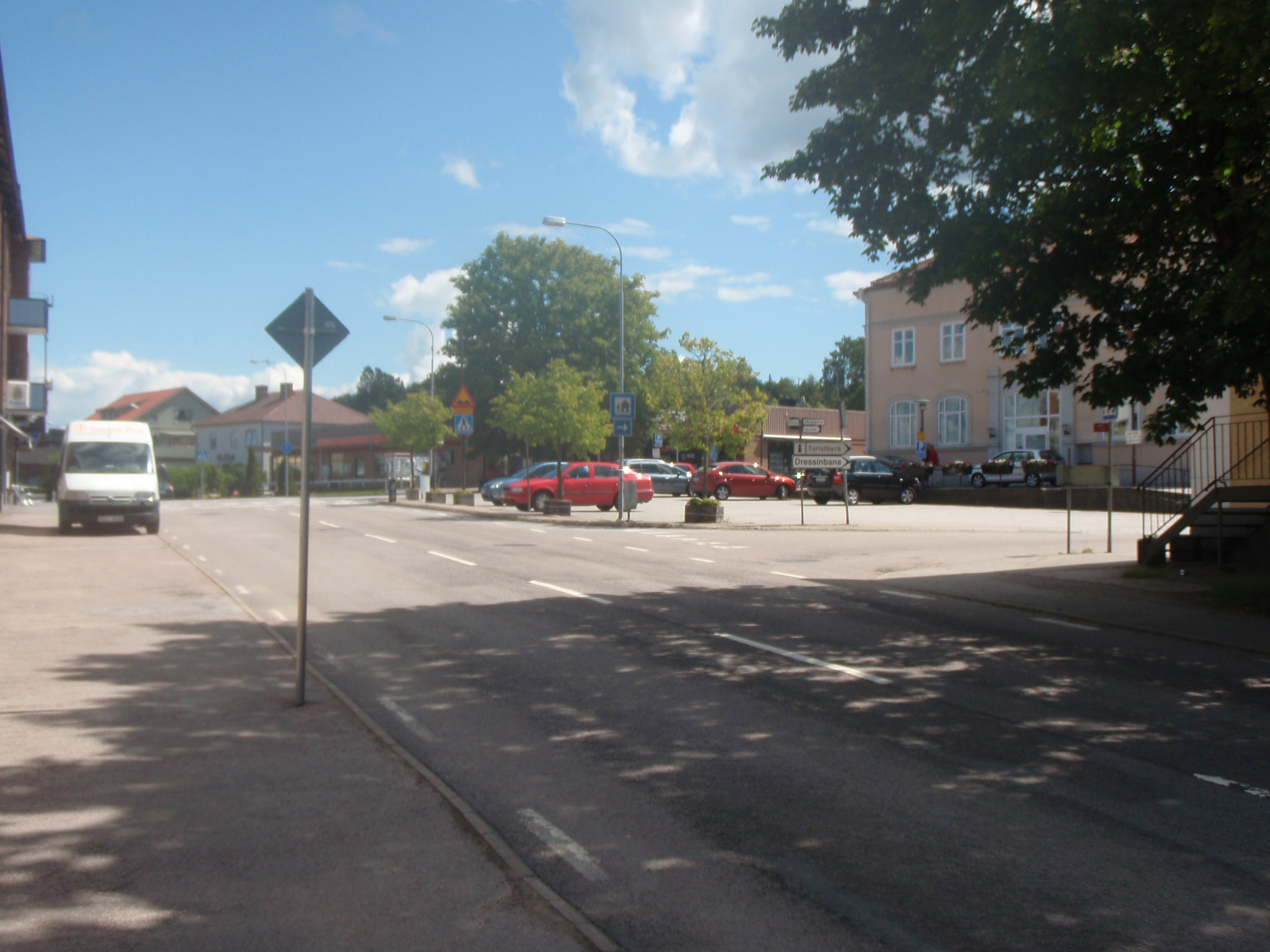 Bild av Gullspångs centrum